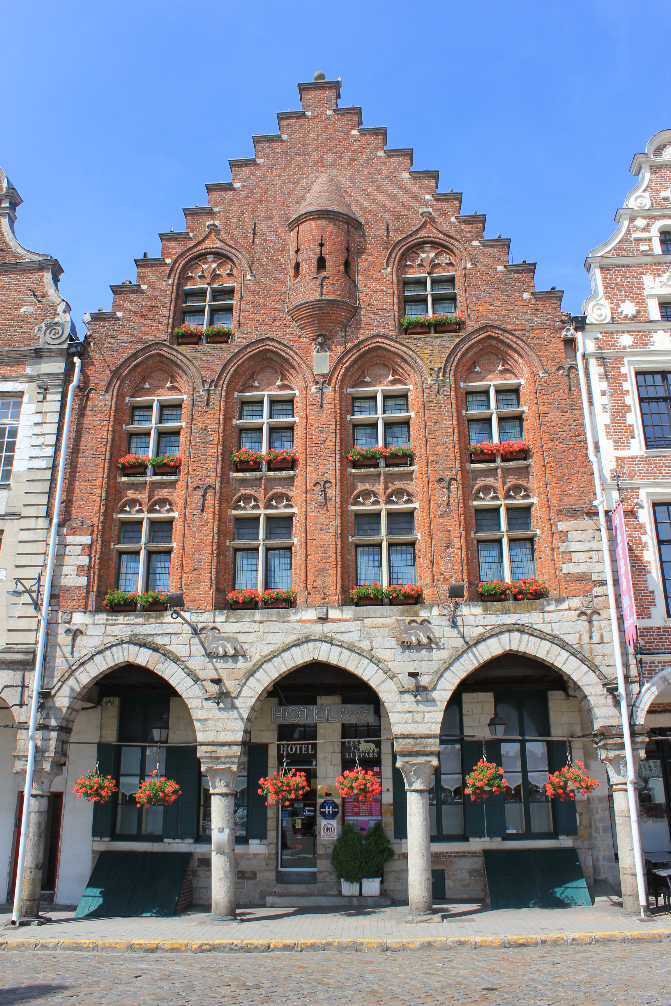 Arras (62) La Grande Place Arras,La Grande Place Hôtel les trois lupars